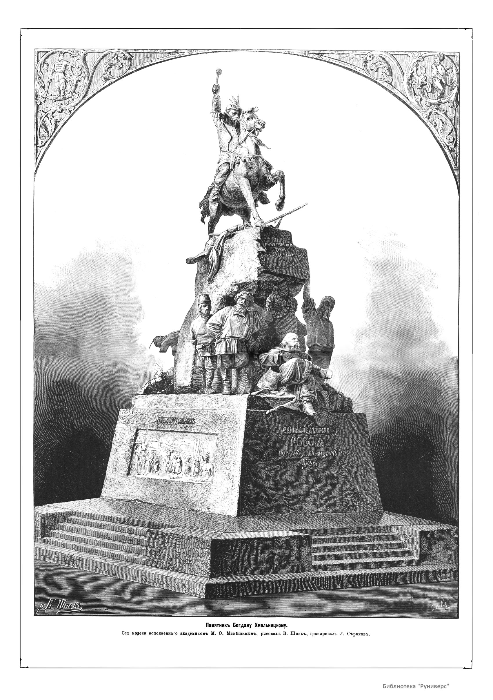 Модель памятника Богдану Хмельницкому, исполненного М.О. Микешиным